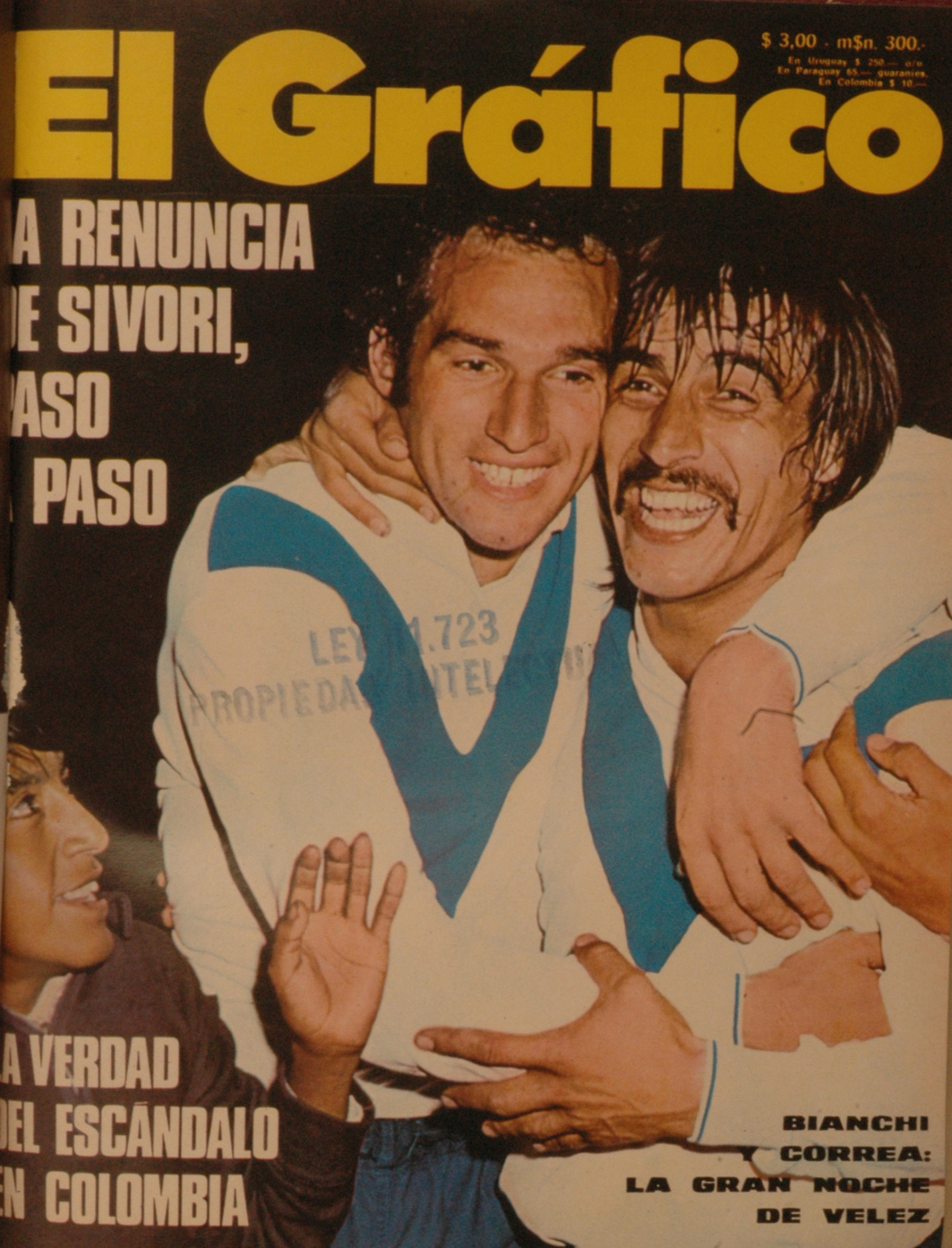 El Grafico del 17 de Abril de 1973. Edicion 2793